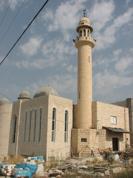 Sandala mosque